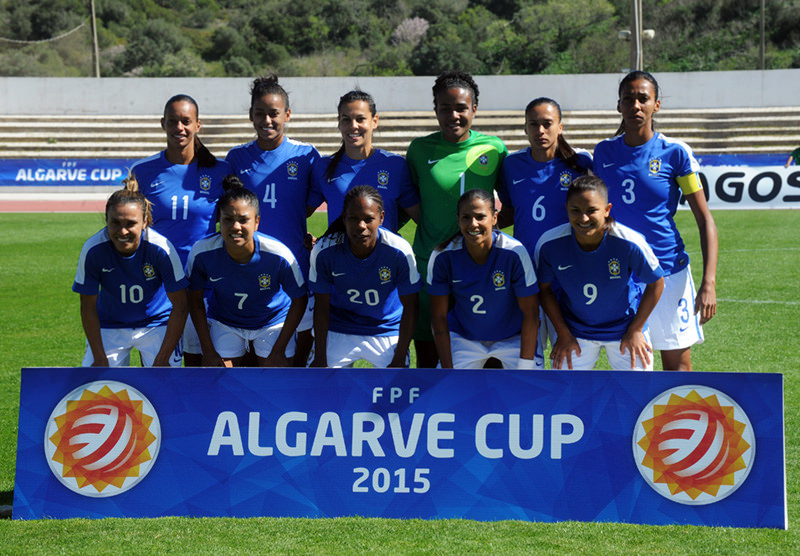 a_27_5822